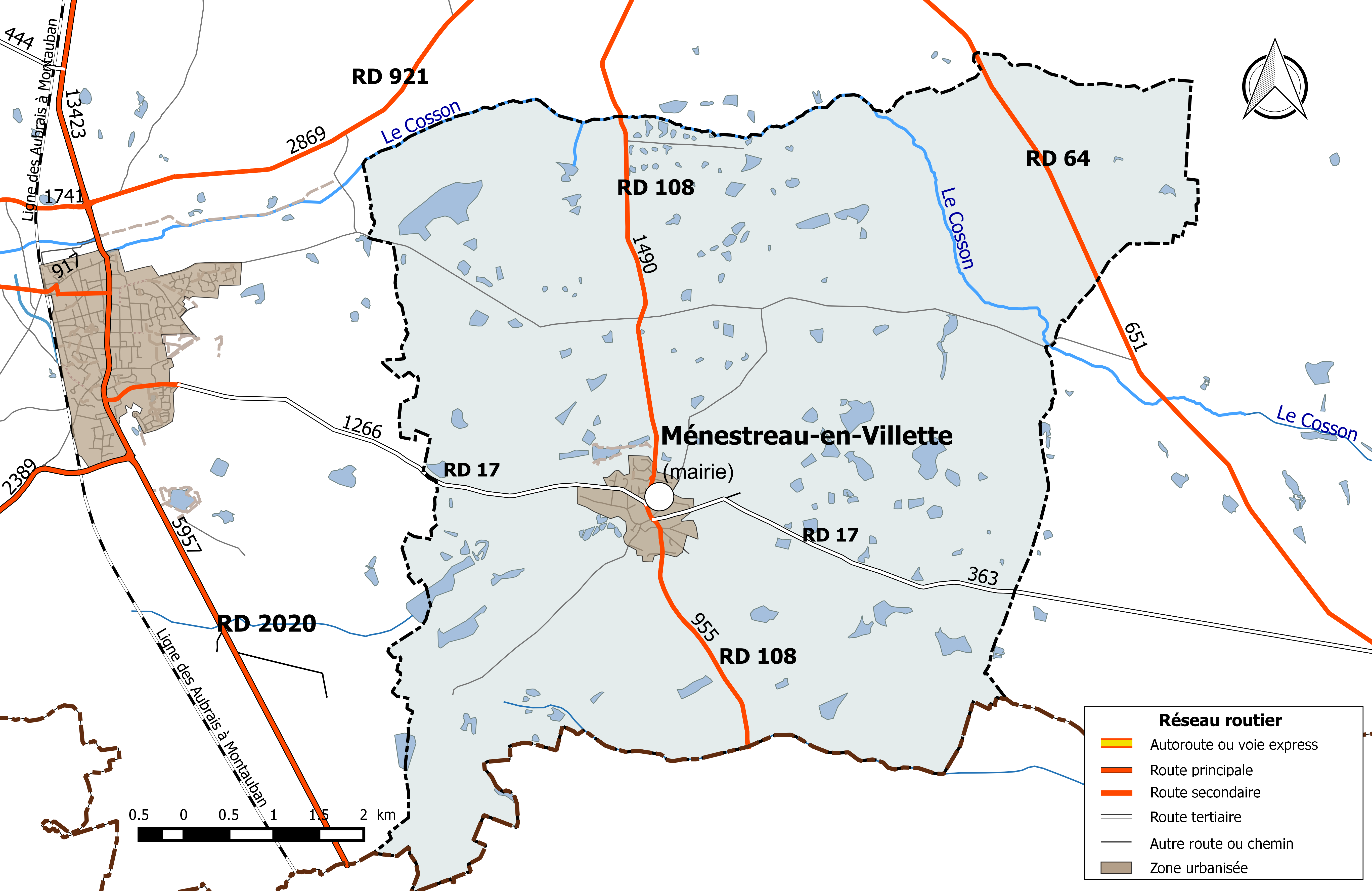 Carte du réseau routier de la commune de Ménestreau-en-Villette.